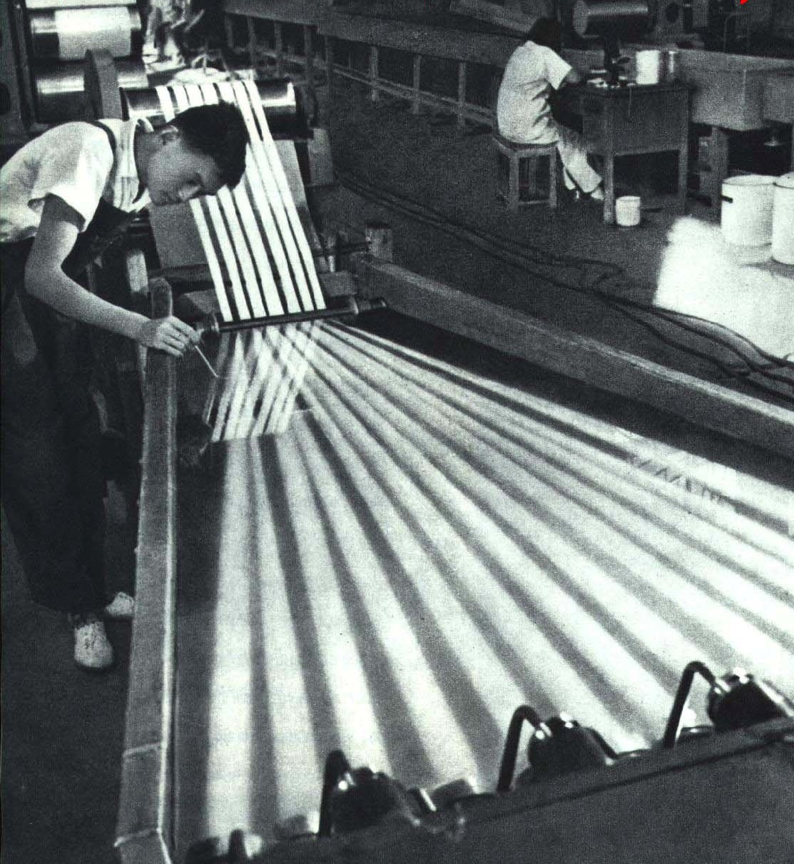 1964-03 1964年 上海合成纤维试验厂